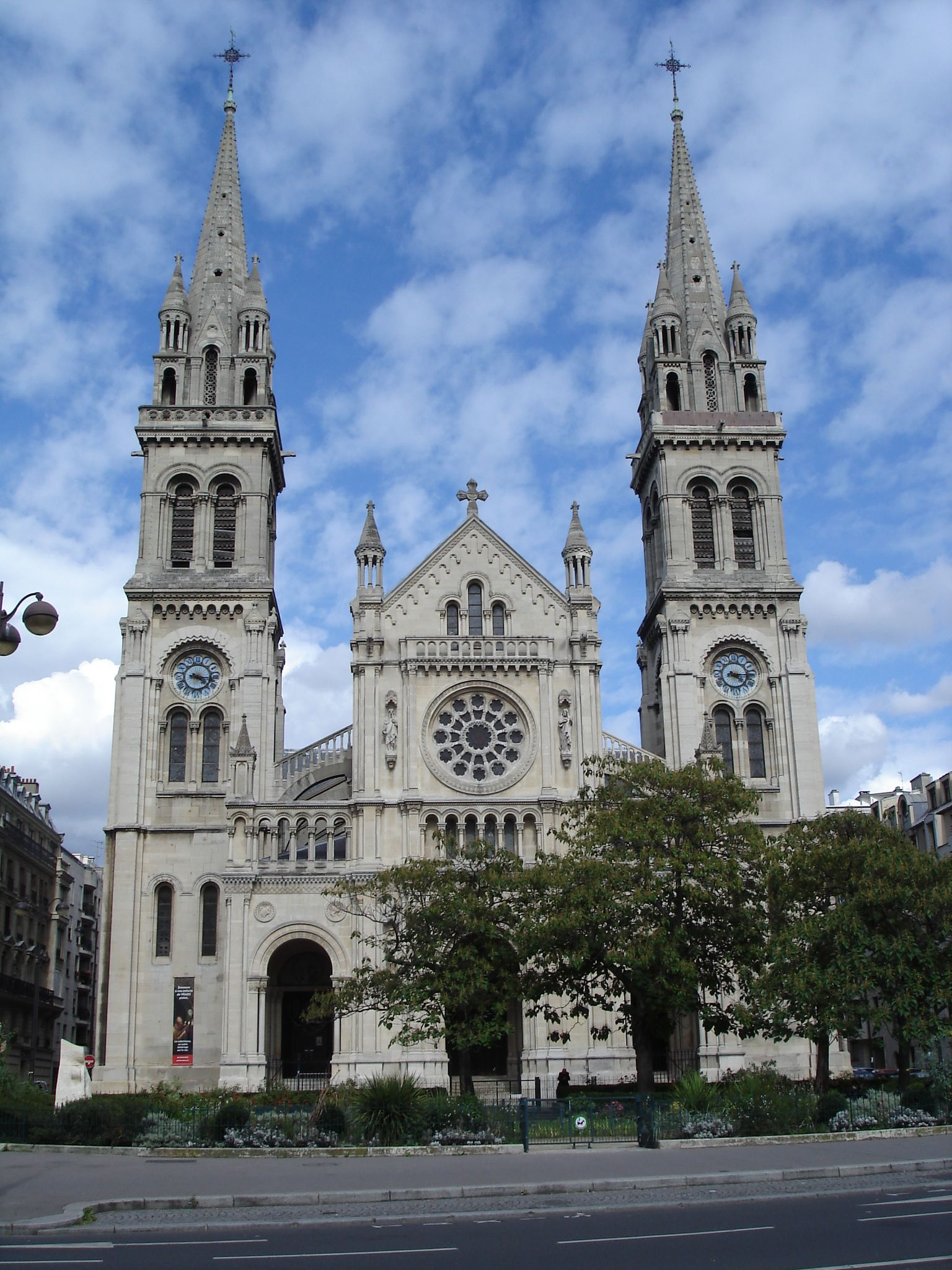 Eglise St-Ambroise; Boulevard Voltaire